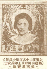 福建省南屏縣縣長王孝英女士